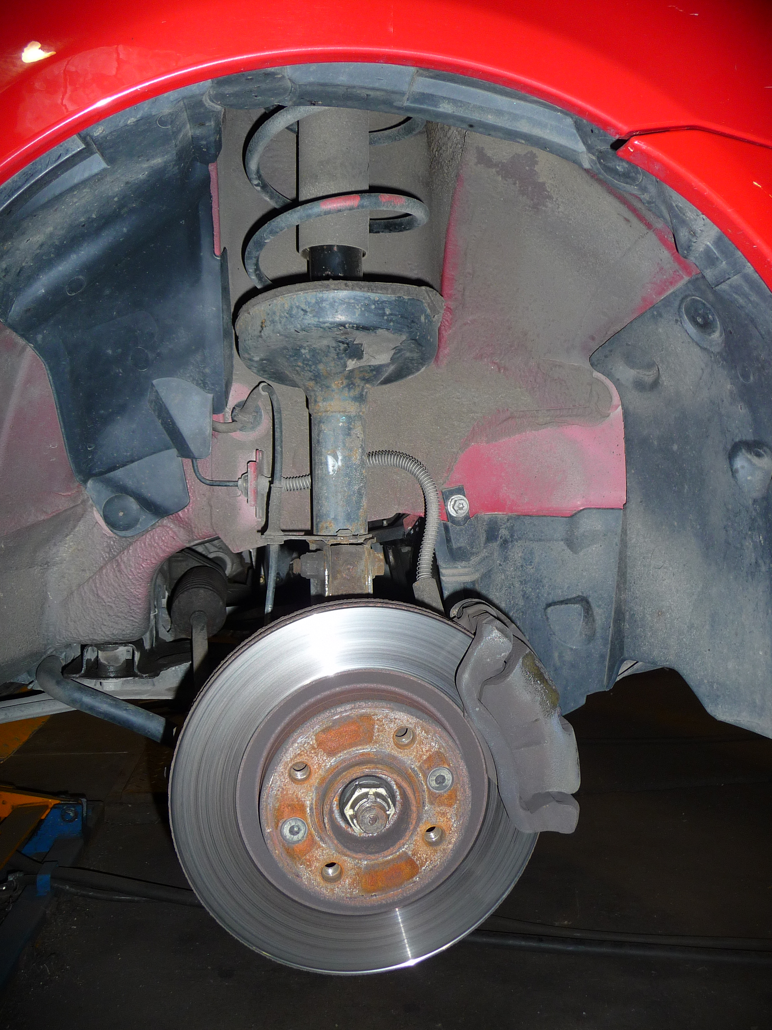 Radaufhängung